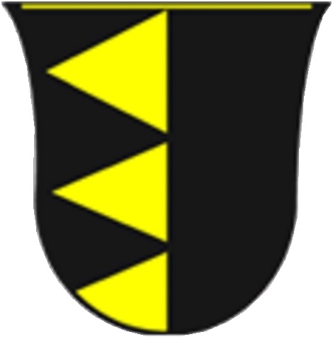 Es entspricht dem Familienwappen der Familie Weißpriach.